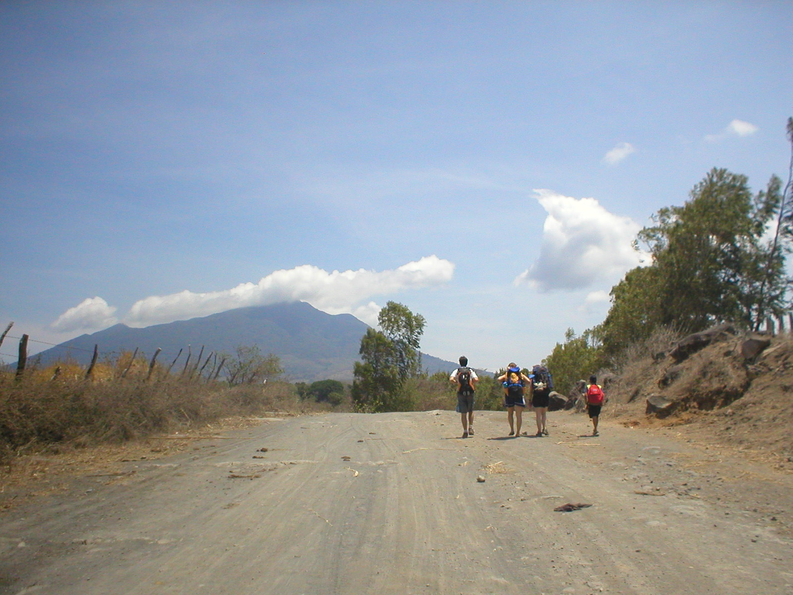 サントドミンゴの道路を歩く人達.Walking to Santo Domingo